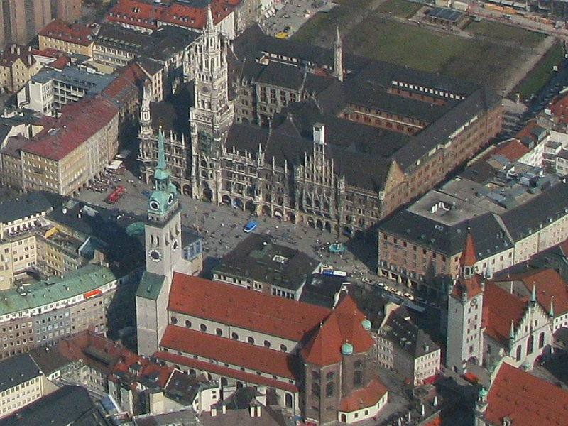 Luftbild München Marienplatz mit Altem Rathaus und Neuem Rathaus Foto April 2009 Wolfgang Pehlemann Wiesbaden IMG_1334